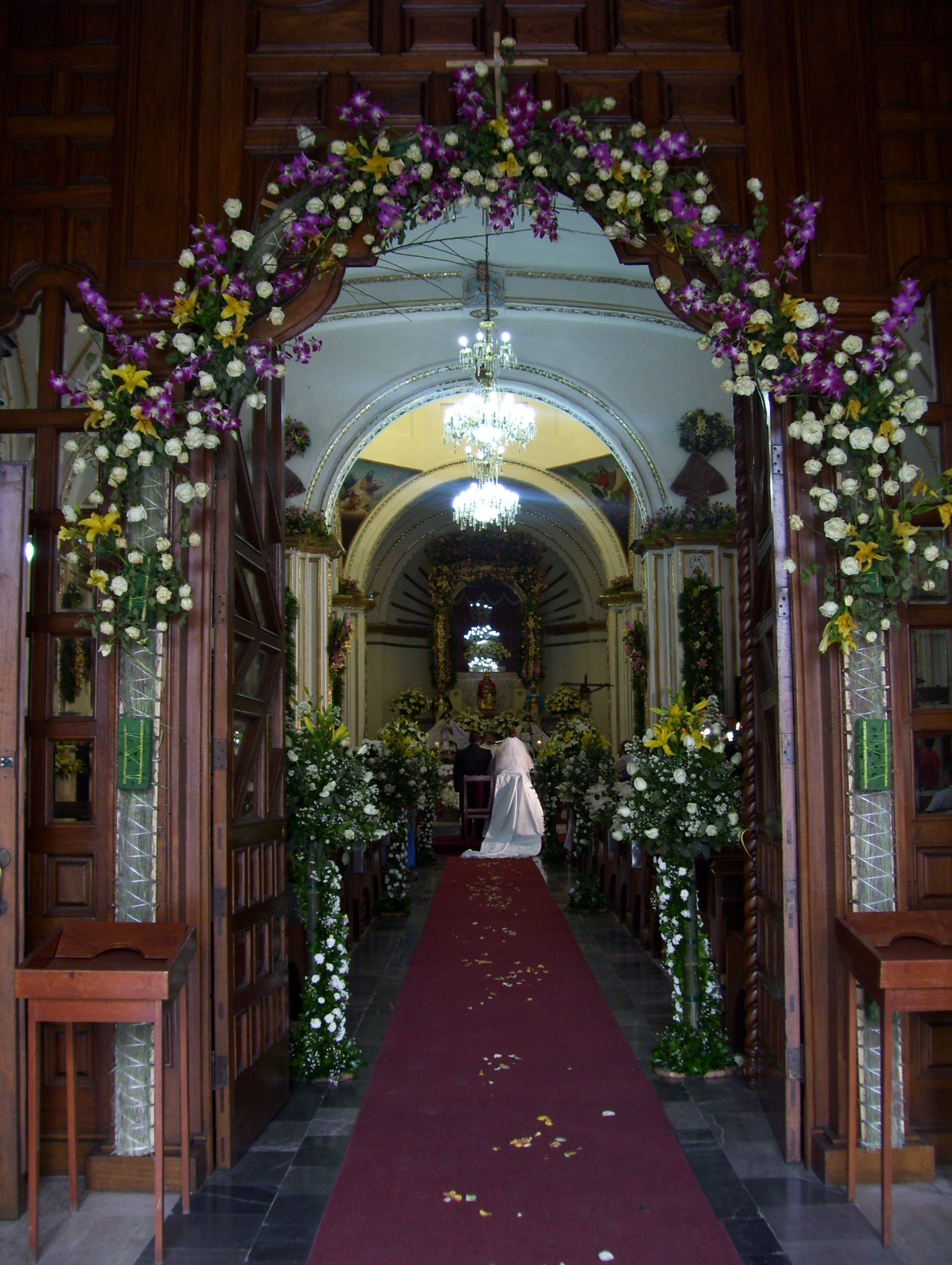 Interior del Templo de los Santos Reyes durante la celebración de un matrimonio